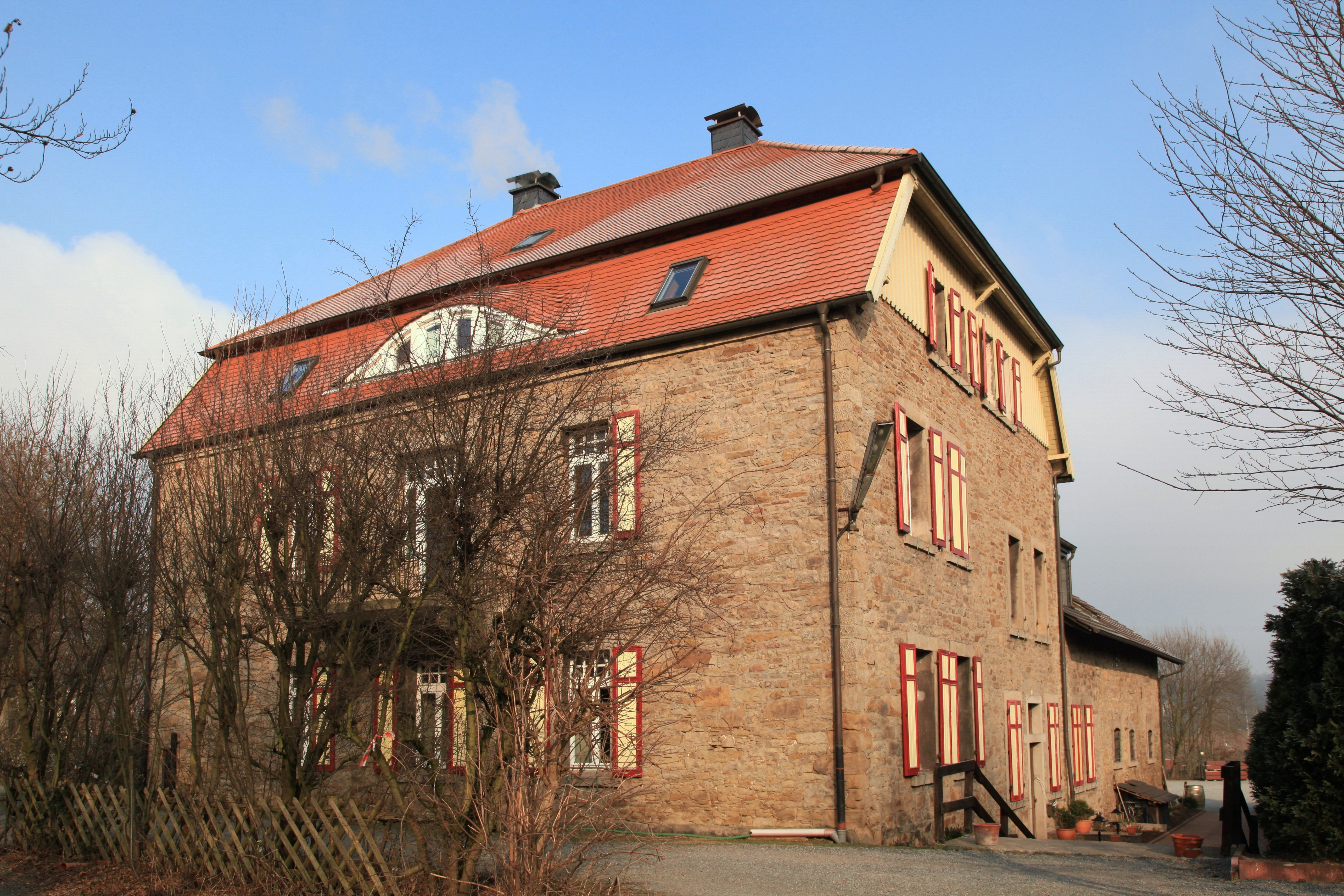 Haus Weile, Ruhrdeich in Hattingen